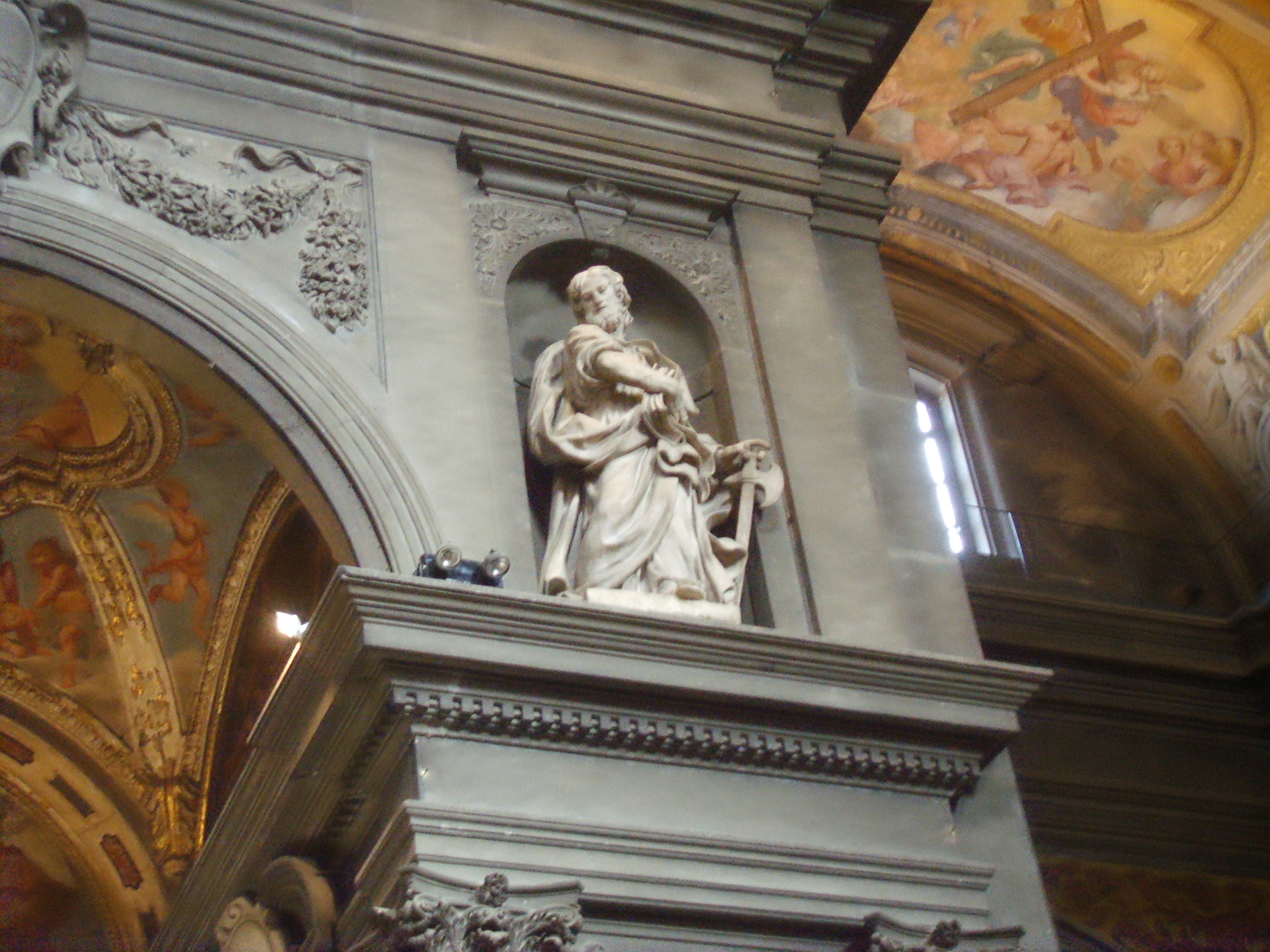 Chiesa di san gaetano, 3left, san mattia, giovacchino fortini 1696